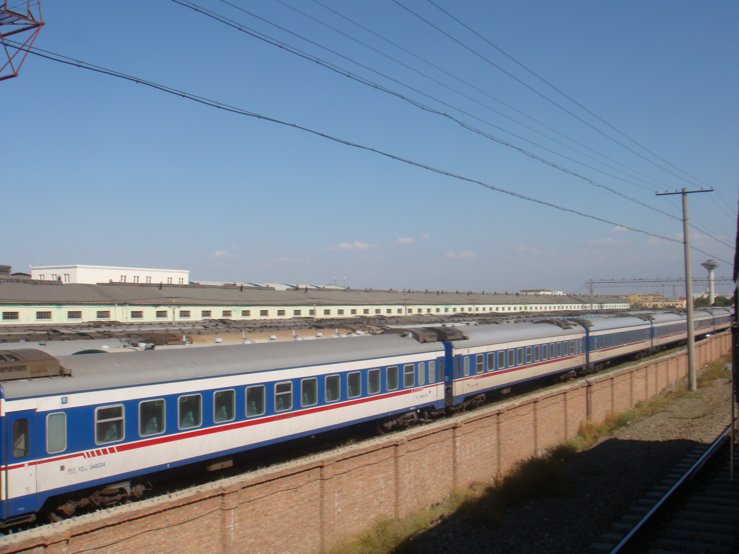 乌鲁木齐.火车西站车辆段 China Xinjiang Urumqi Welcome you to tour the, Китай Синьцзяна Урумчи приветствовать Вас на экскурсию, الصين ترحب زيارتك لاورومتشى فى شينجيانغ, 中国新疆のウルムチへの訪問を歓迎する, 中国新疆乌鲁木齐欢迎您来观光旅游